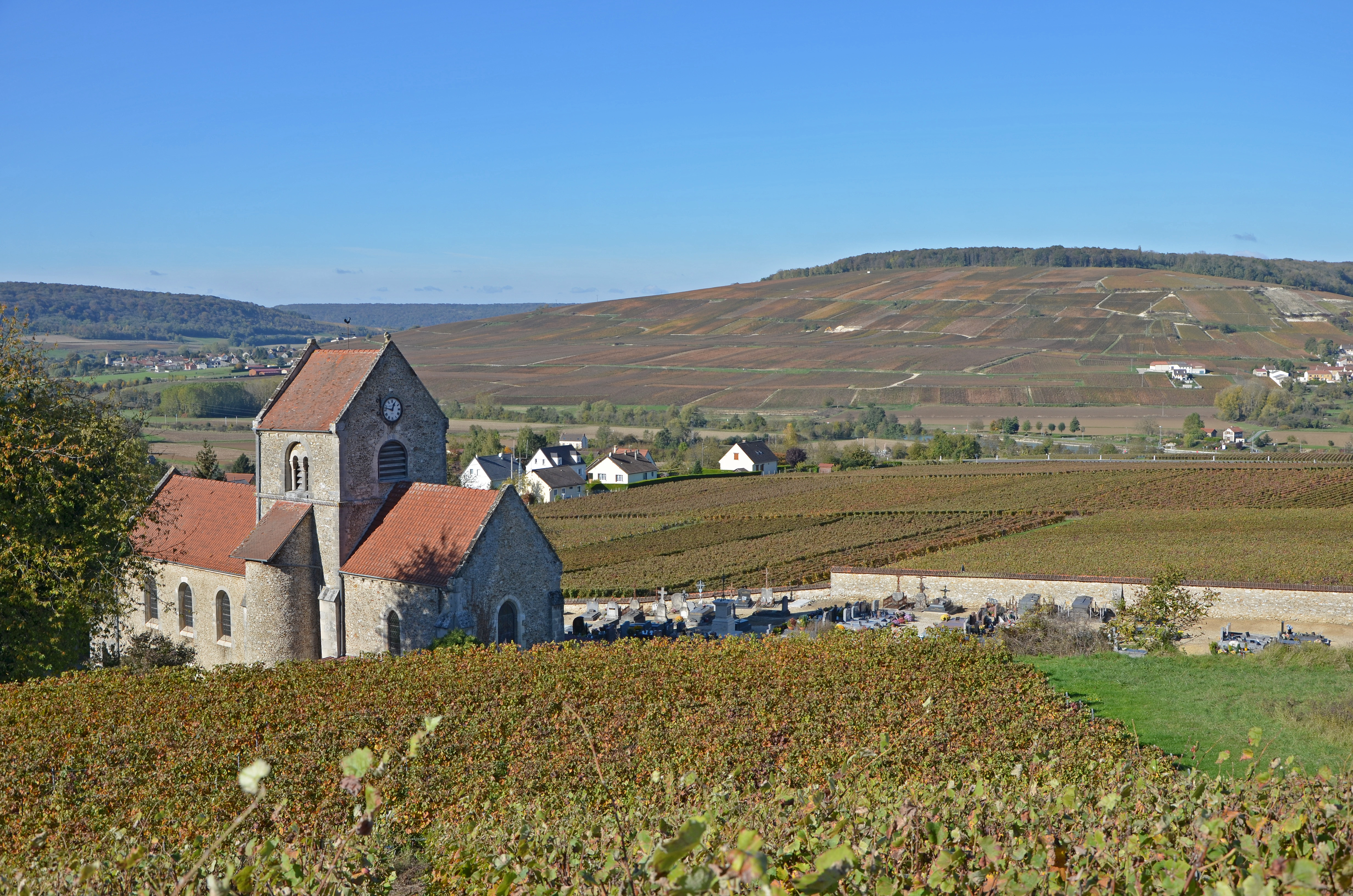 Vignoble de Champagne à Courthiézy dans la vallée de la Marne, Marne, Champagne-Ardennes, France